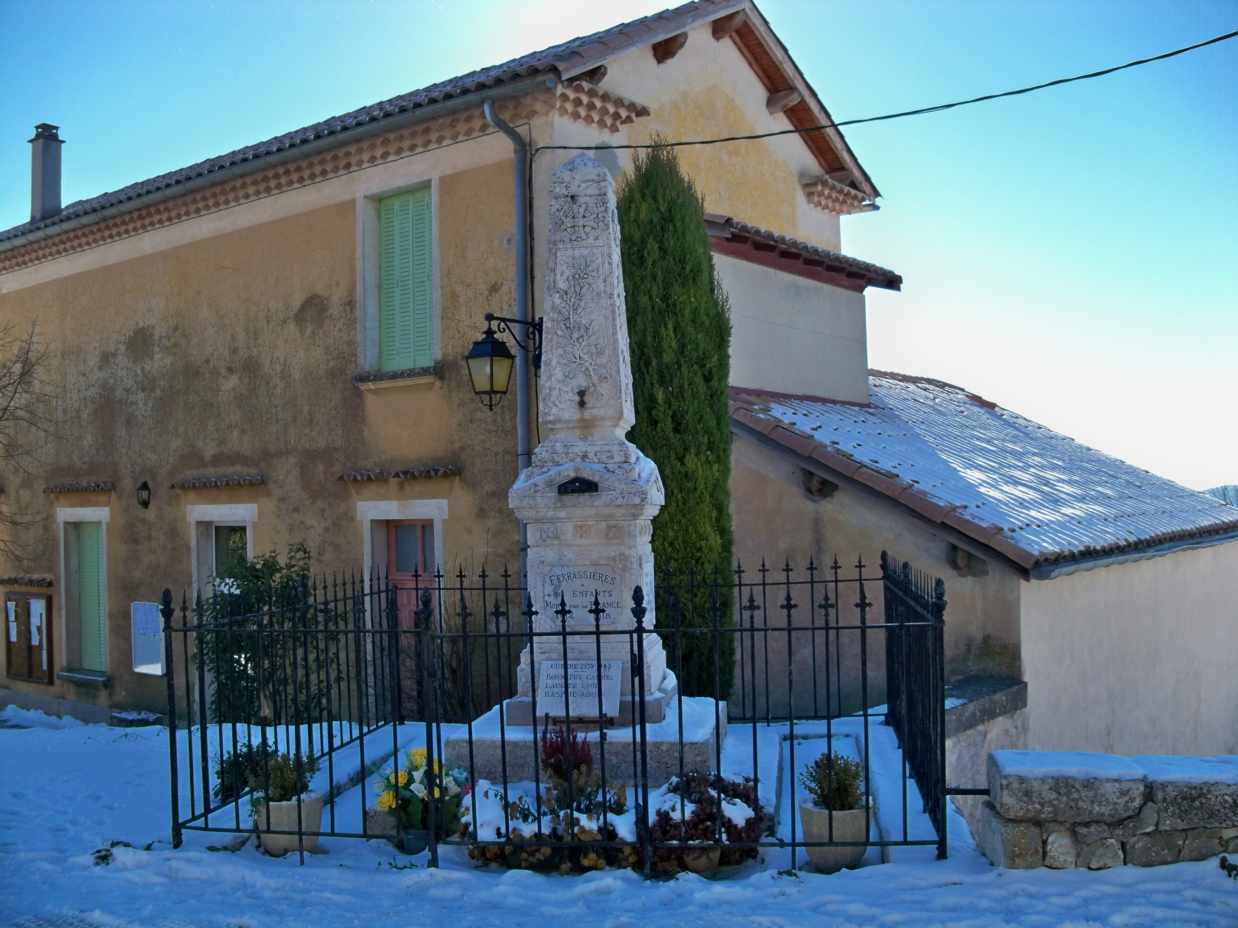 Monuments aux morts de Ferrassières, Drôme, France